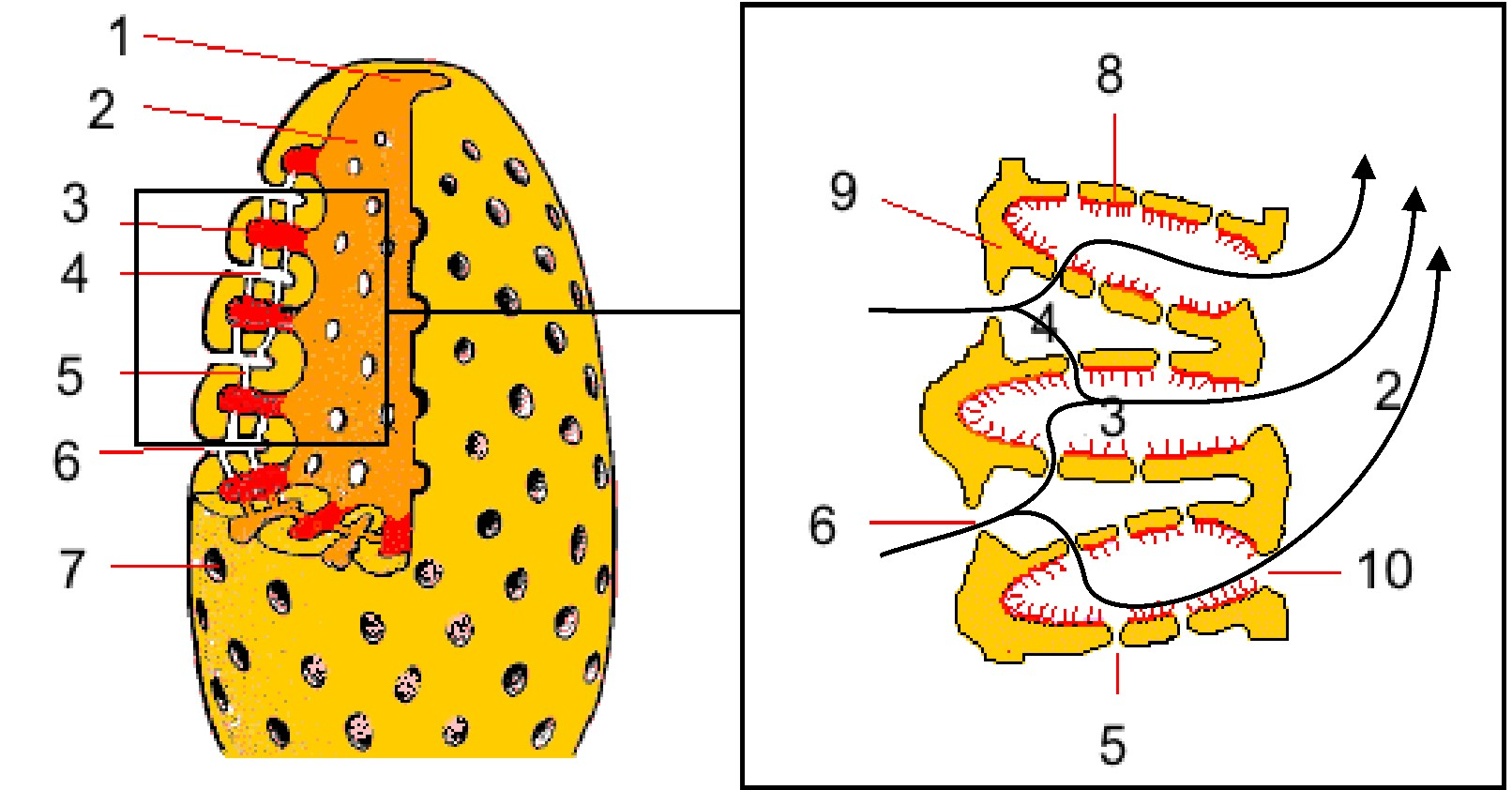 Sikon anatomy